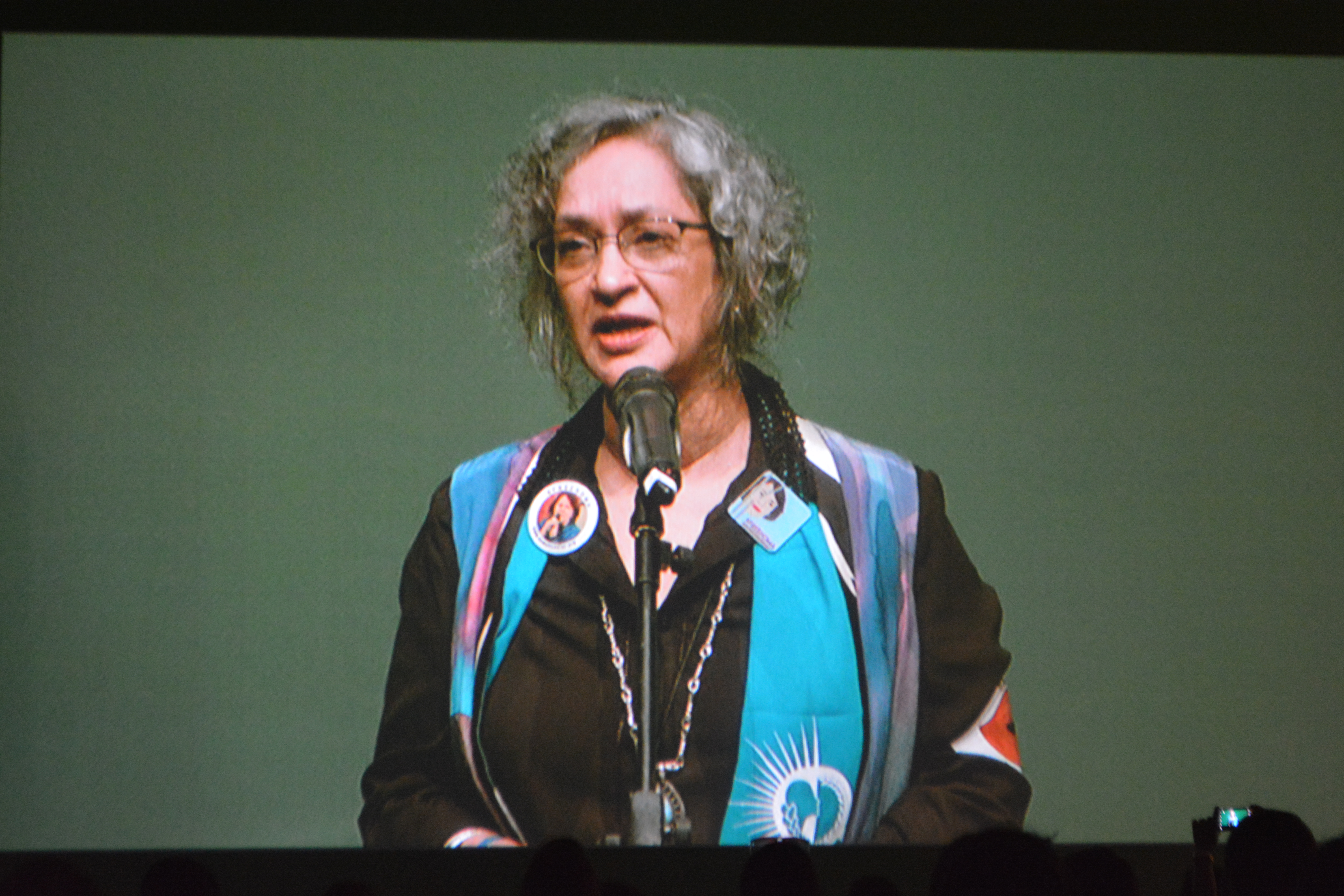 Feminista en AWID 2016